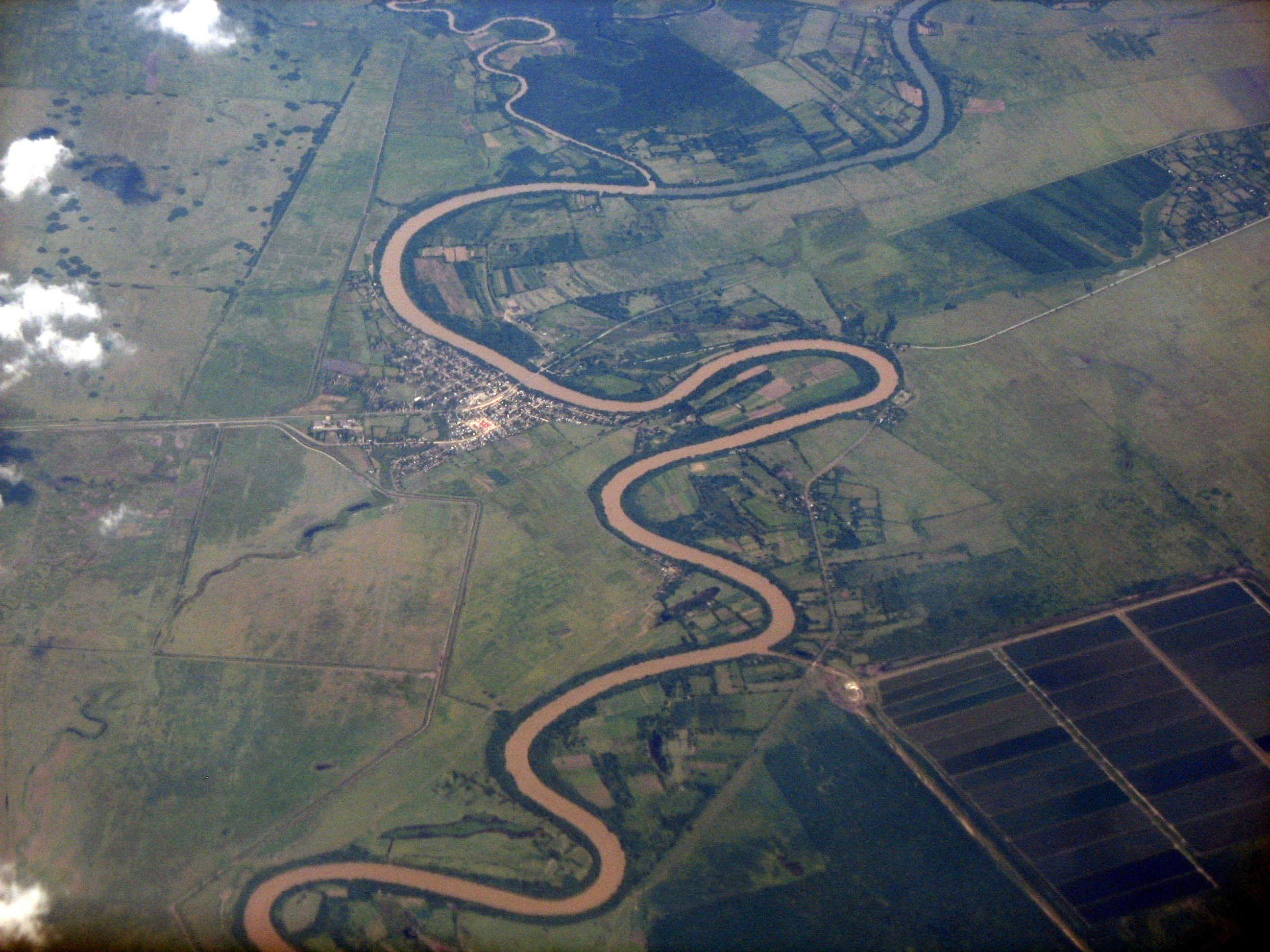 Foto aerial de el Río Cauto acerca de Guamo Embarcadero, consejo popular del municipio de Río Cauto, Cuba.Not home 04:03, 2 October 2007 (UTC)